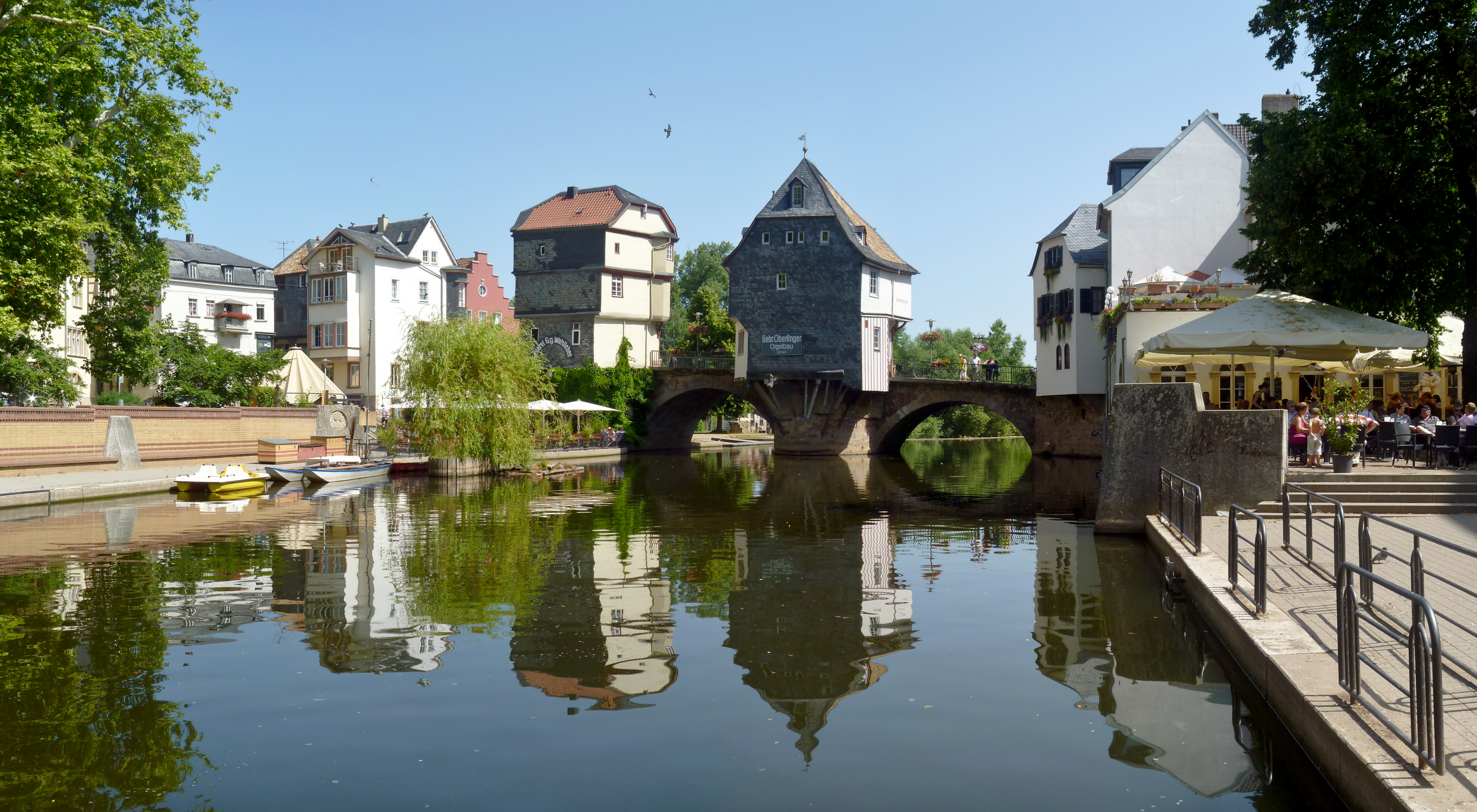 Die Alte Nahebrücke ist eine Brücke in Bad Kreuznach und gehört neben der Krämerbrücke in Erfurt und der Neckarbrücke in Esslingen zu den noch bestehenden Brücken, die mit Häusern bebaut ist. Die Steinbrücke hat eine Länge von 135 Meter und führt über die Nahe und dem Mühlenteich, einen Nebenarm der Nahe. Erbaut wurde die Brücke 1332 und diente als Ersatz für eine Holzbrücke.